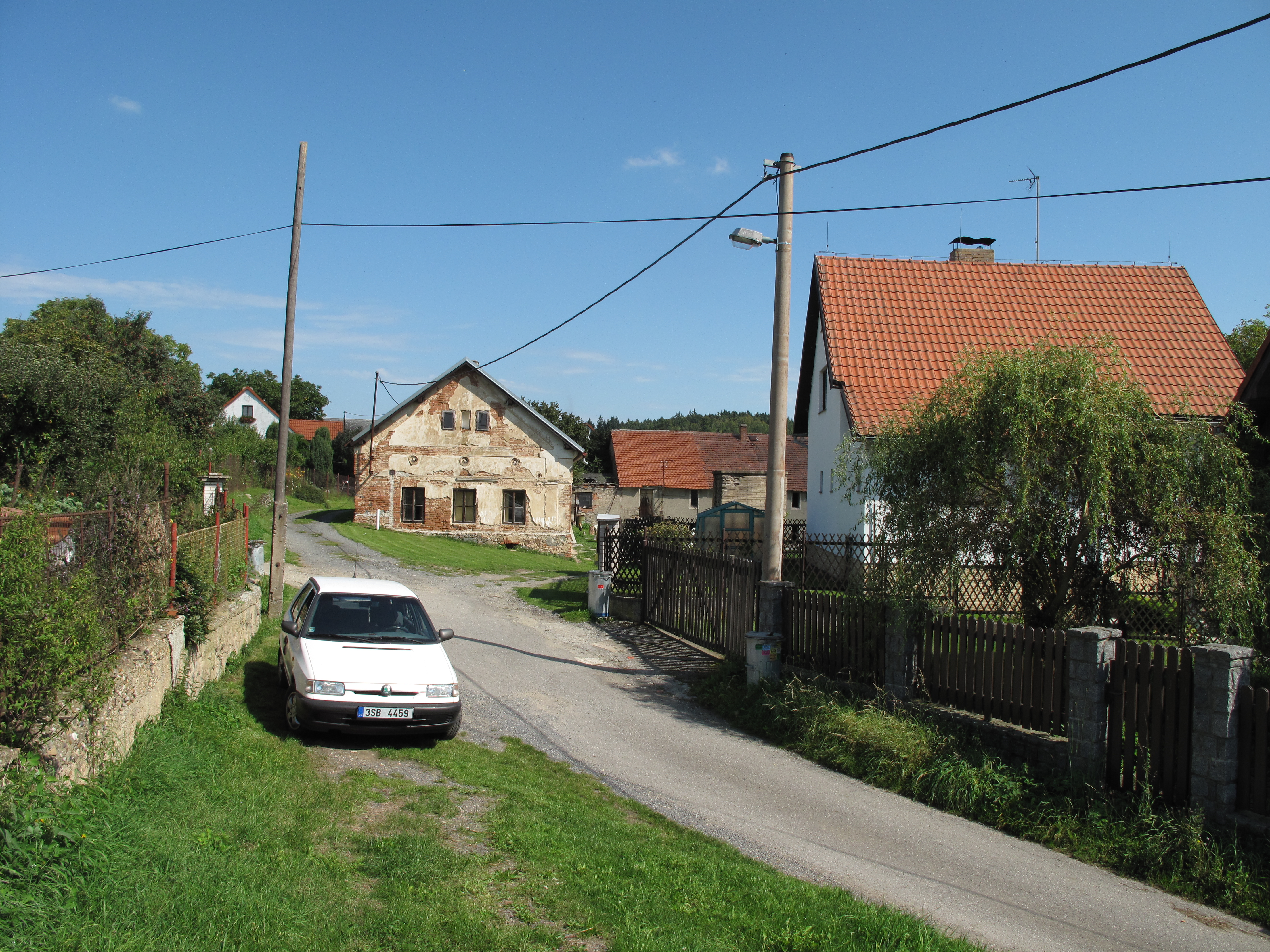 Štít domu v Rabyni. Okres Benešov, Česká republika.